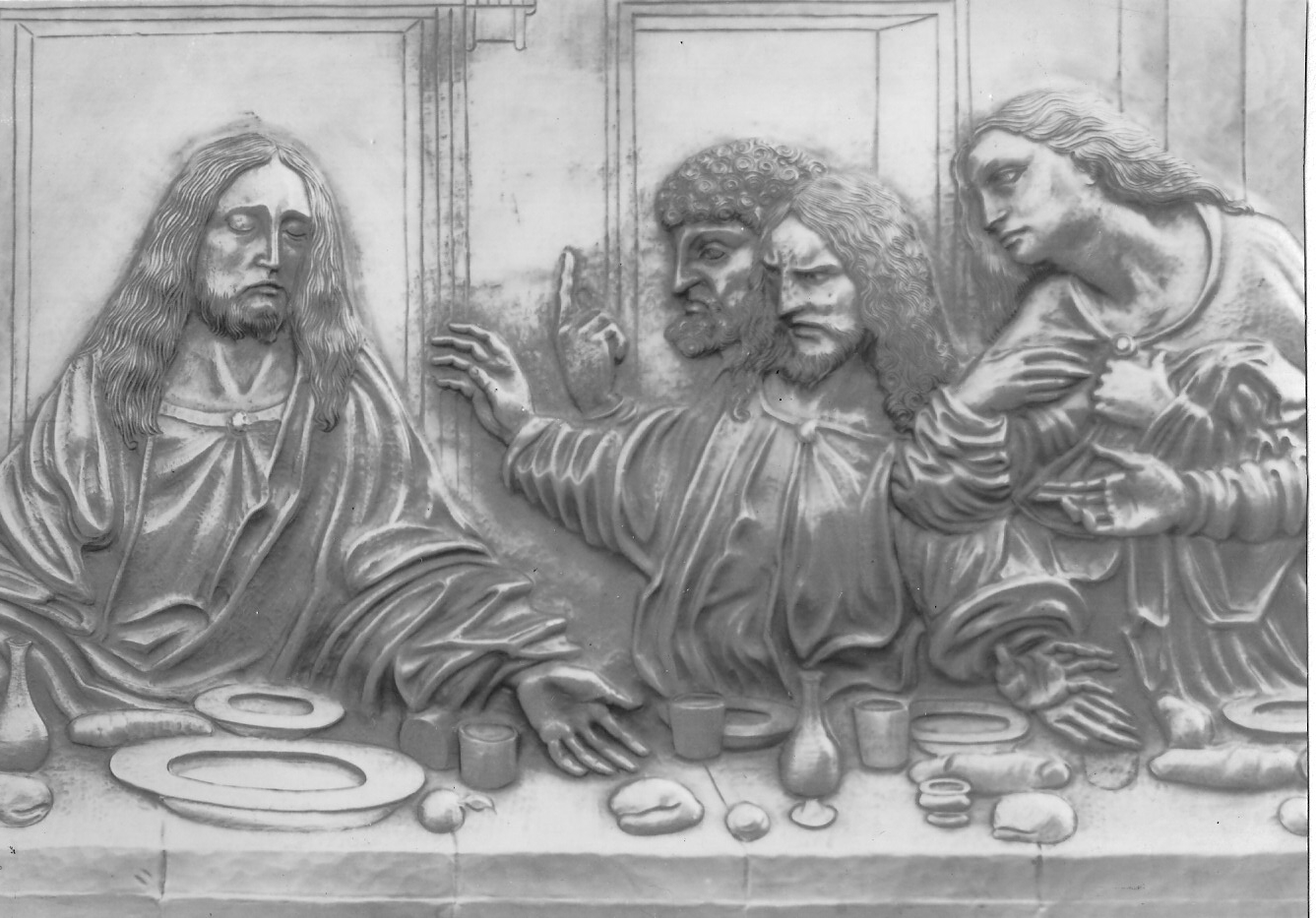 Altar-Relief (Die "CENA"), Detail, nach Leonardo da Vincis Cenacolo im Refektorium des Dominikanerklosters Santa Maria delle Grazie in Mailand